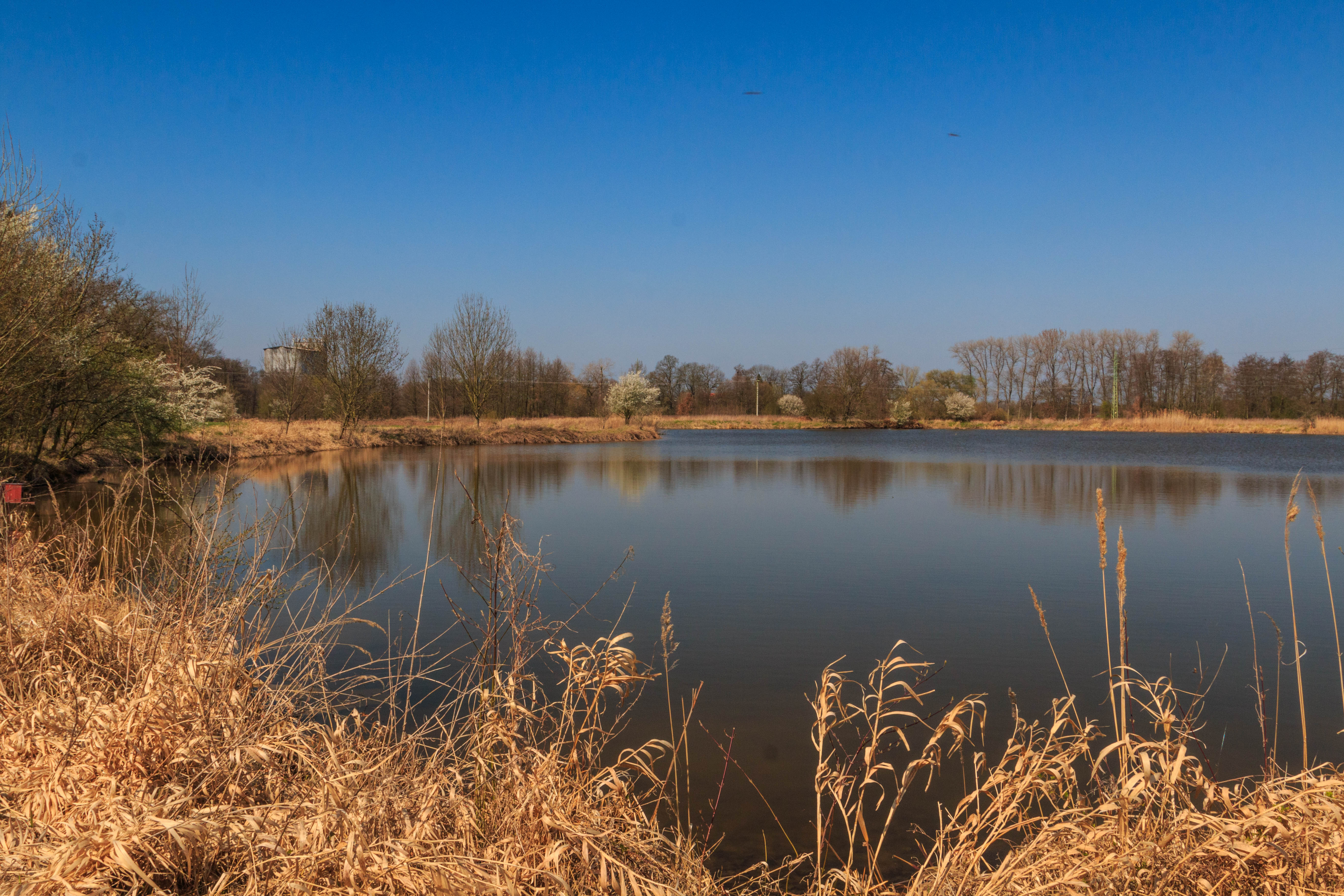 Zajícův rybník u Přelouče Project: Vodstvo.